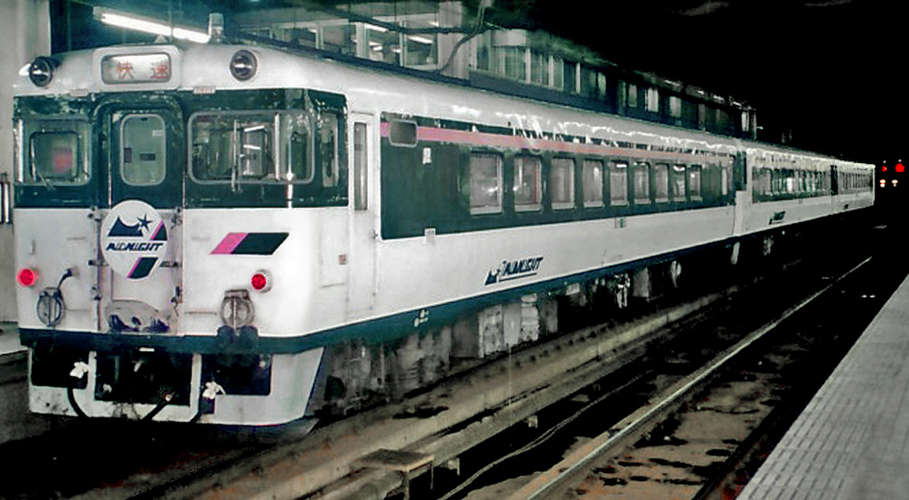 快速ミッドナイト（キハ27形） JR札幌駅にて 1996年3月26日 撮影ja:User: Eadeam